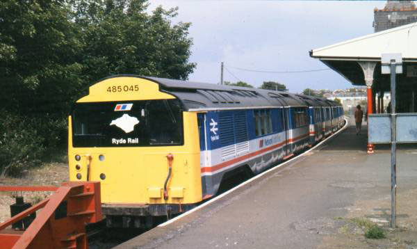 485 045 at Shanklin.